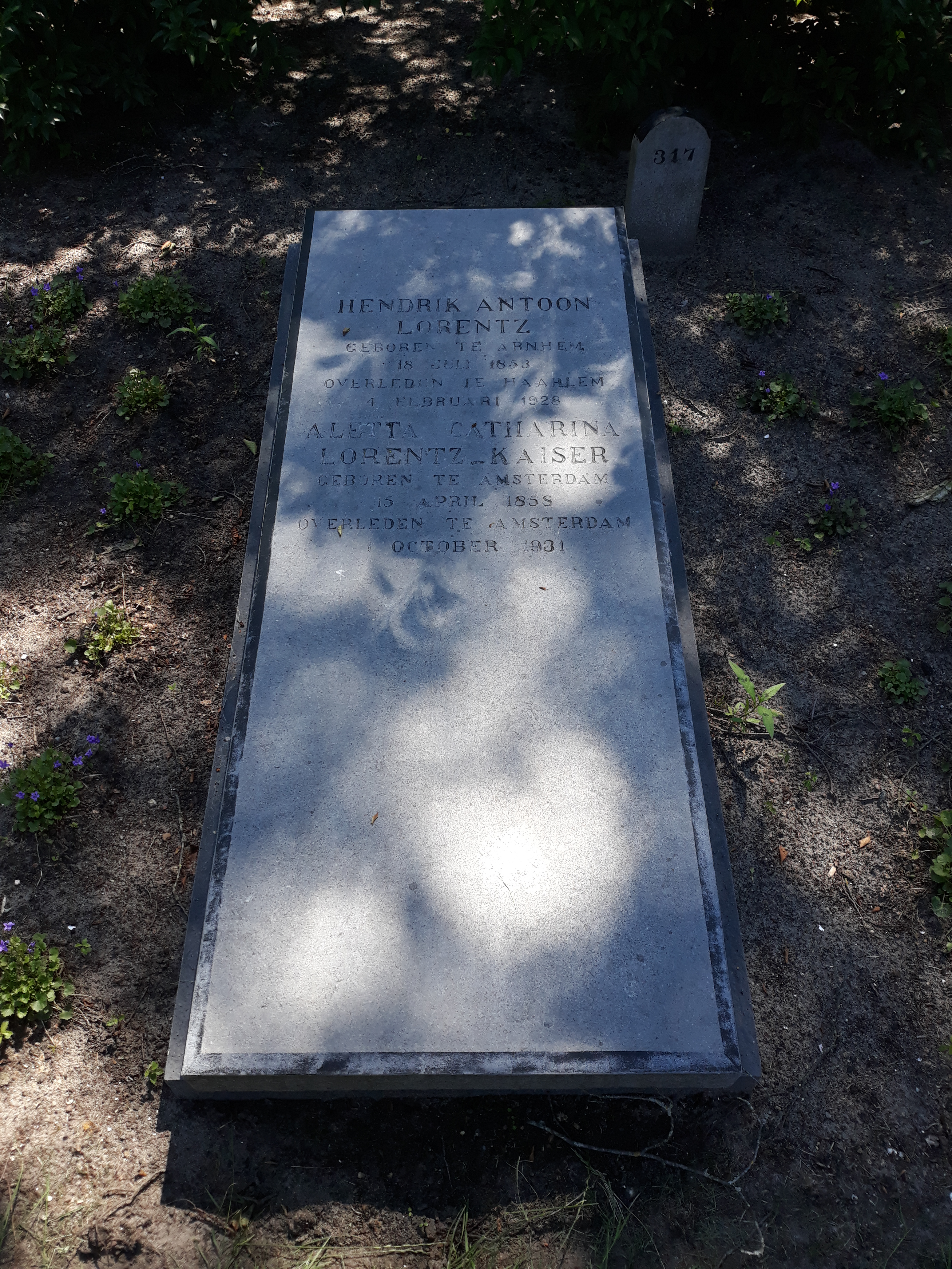 Das Grab des niederländischen Physikers und Nobelpreisträgers Hendrik Antoon Lorentz und seiner Ehefrau Aletta Kaiser auf dem Friedhof Haarlem Kleverlaan.